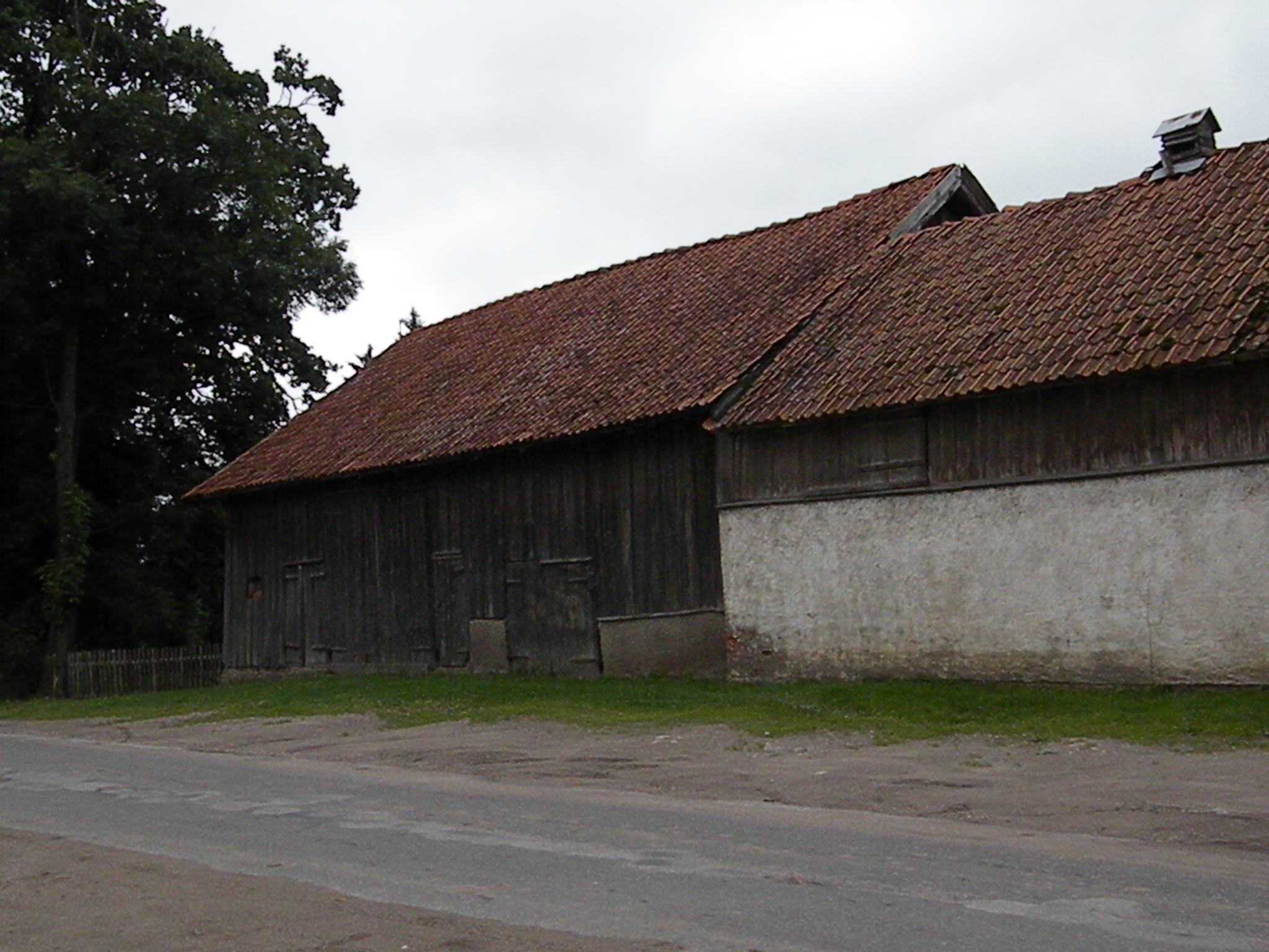 Paluzy, stodoła i obora przy głównej drodze, przed kościołem